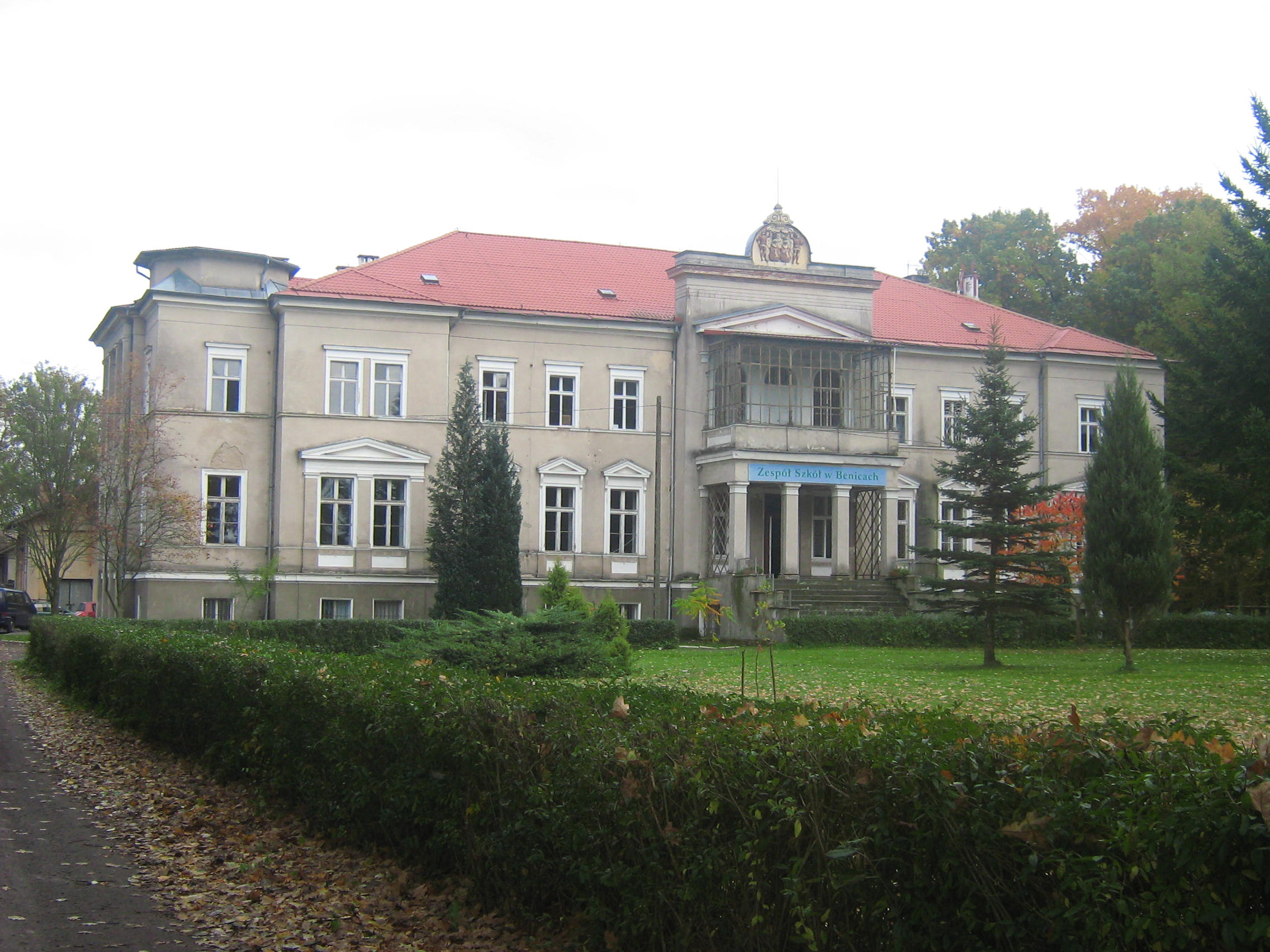 Szkoła w Beniacach